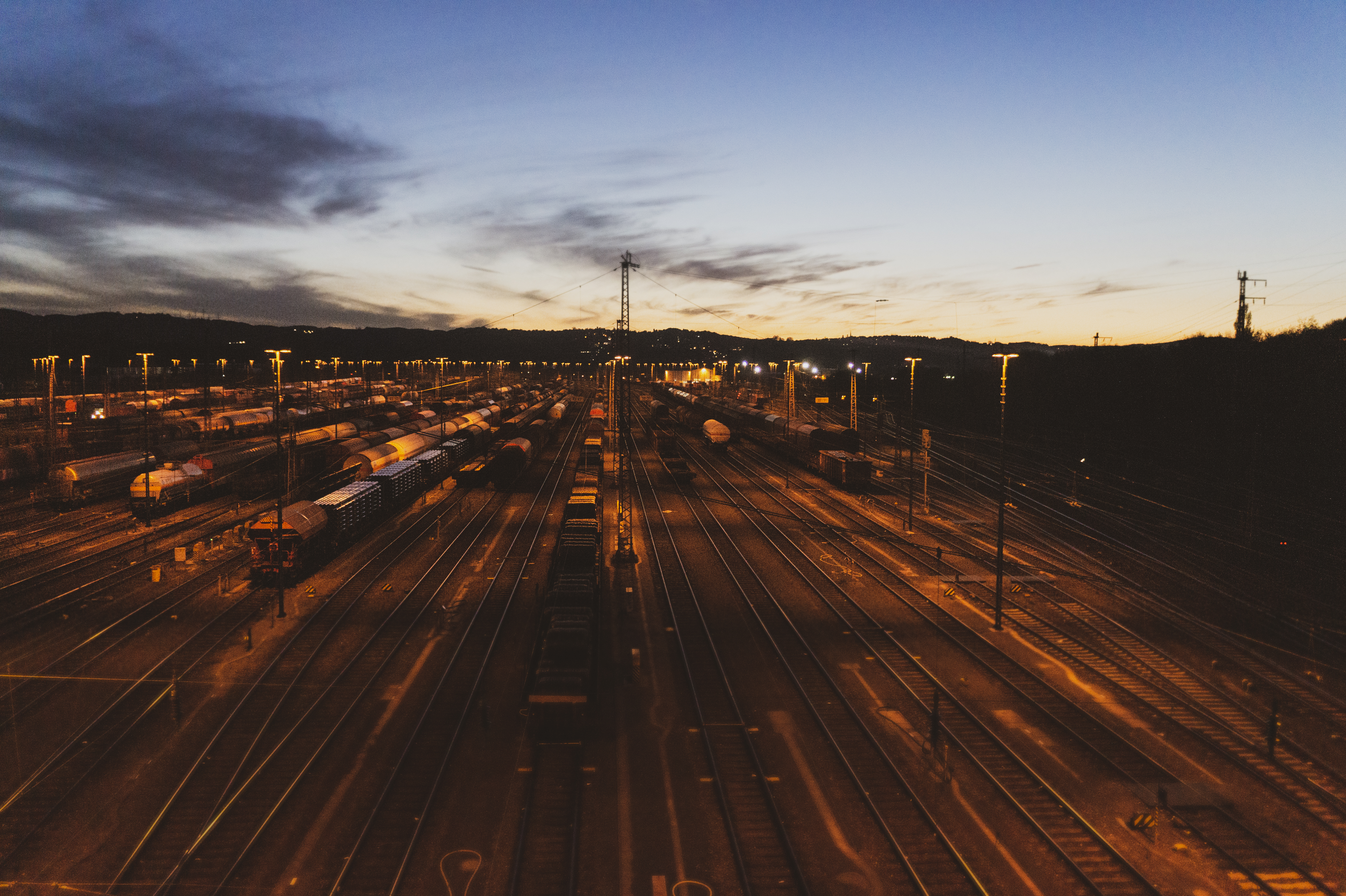 Bahnhof Hagen-Vorhalle. Fotografiert mit Sony α 3000